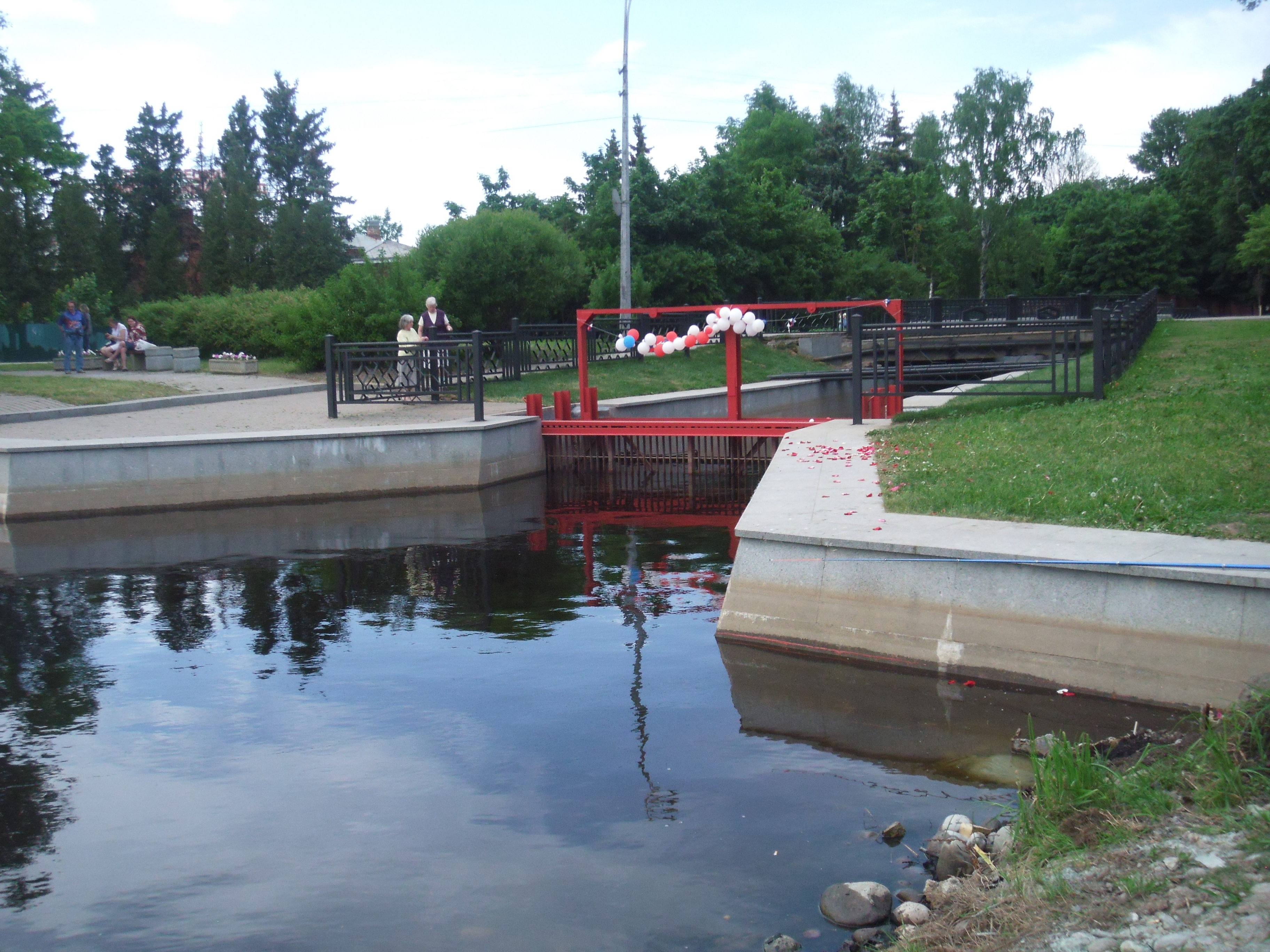 Сестрорецк СПб. Заводская плотина после реконструкции 2013 года